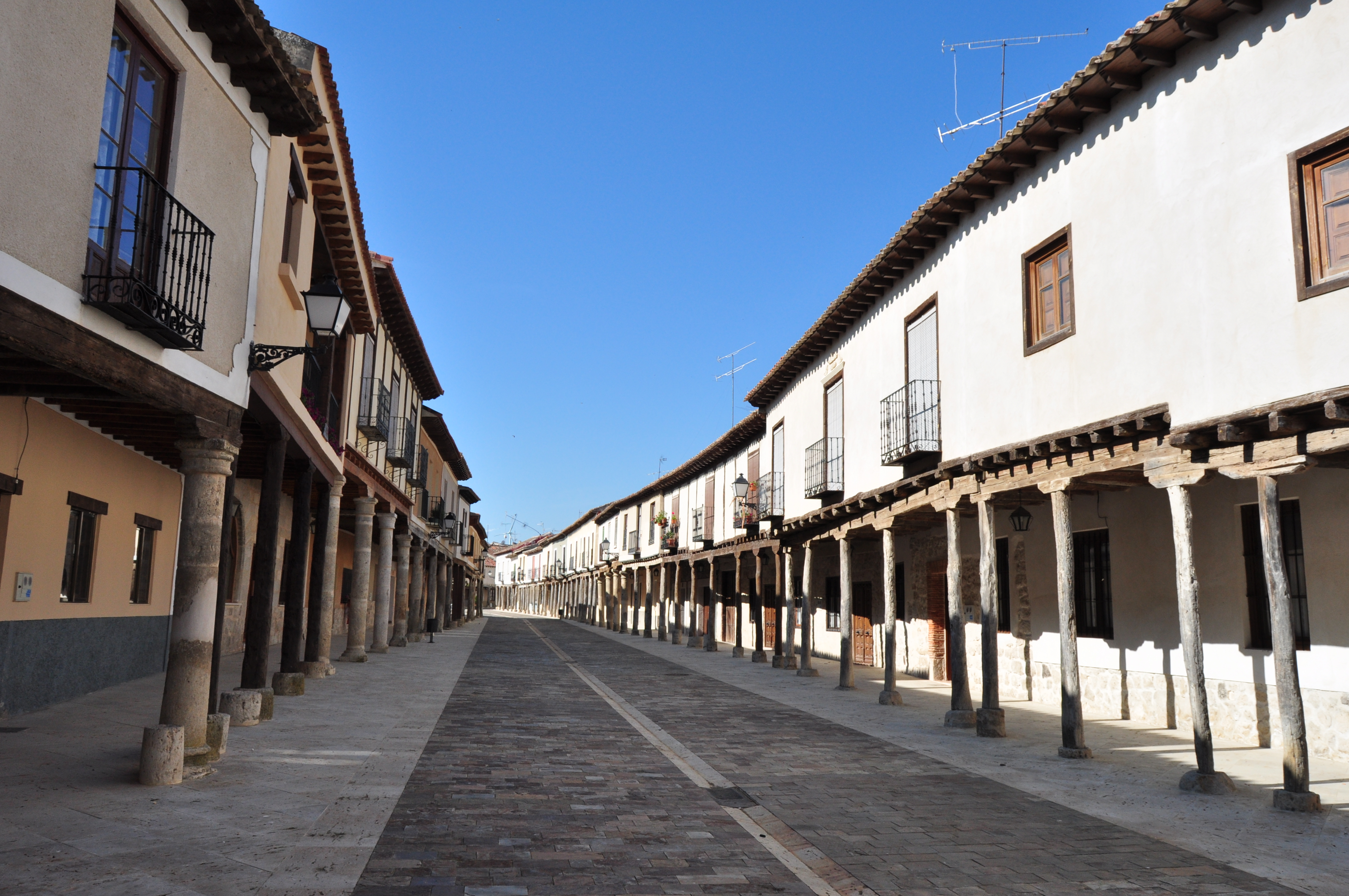 Ampudia - 024